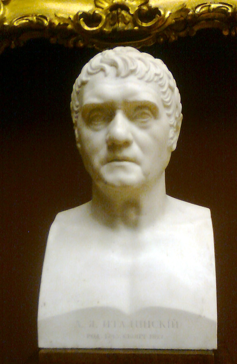 С.И. Гальберг. «Портрет А.Я. Италинского». 1823. ГРМ